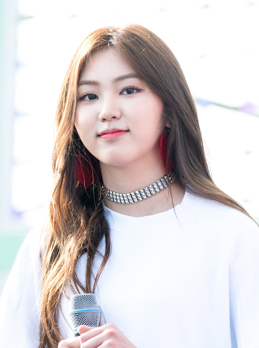 170408 논산딸기 축제 은빈